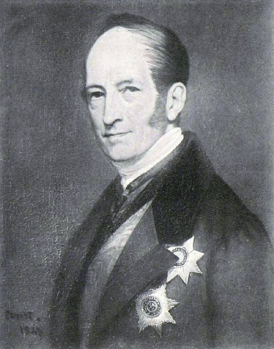 Барон Павел Андреевич Николаи (1777—1866), единственный сын барона Андрея Львовича Николаи (1737- 1820) от брака с Иоганной-Маргаритой Поггенполь (1738-1820); дипломат, с 1818 - 1847 гг был посланником в Копенгагене.